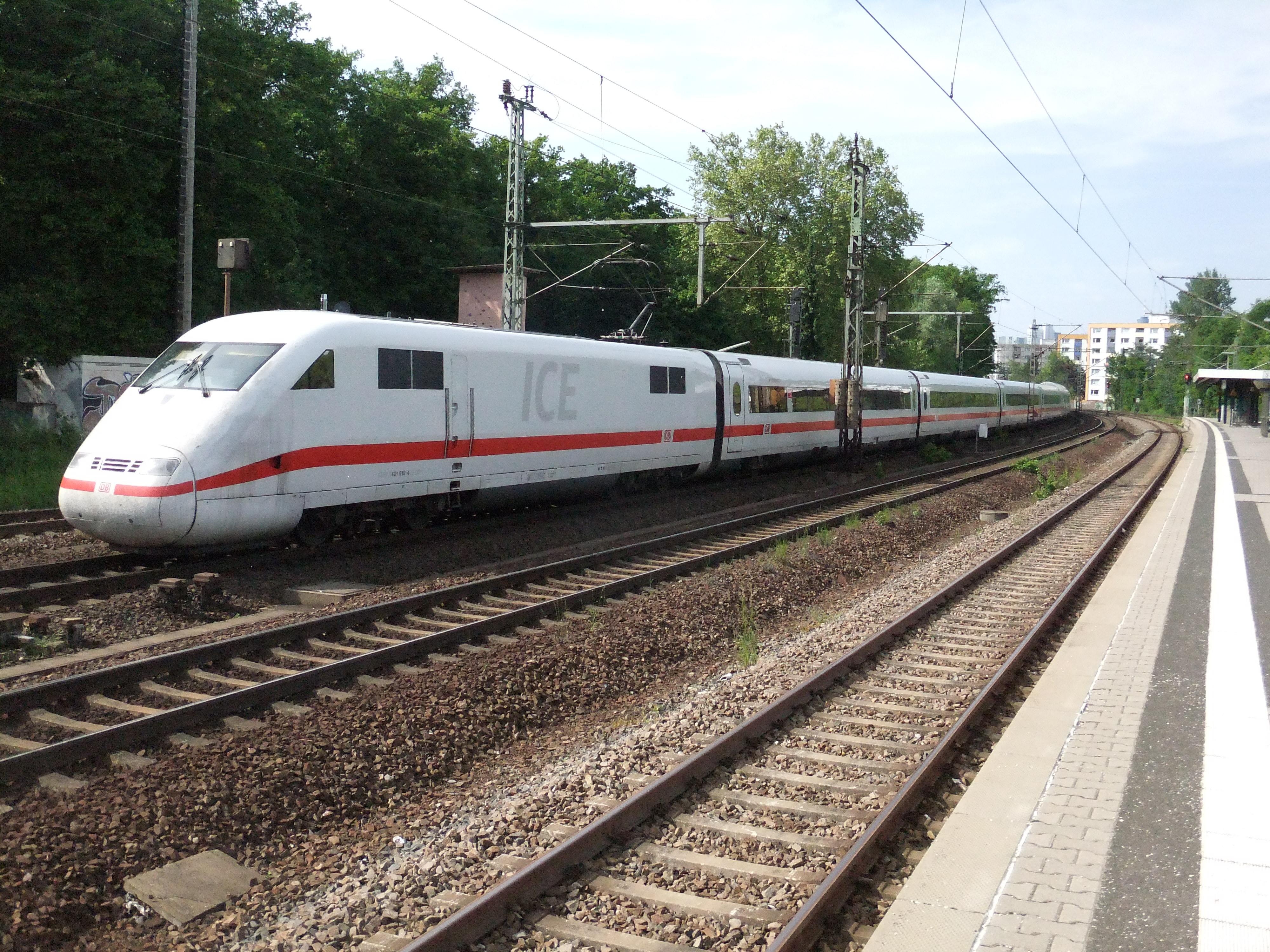 ICE 1 im Bahnhof Frankfurt-Louisa auf Gleis 905